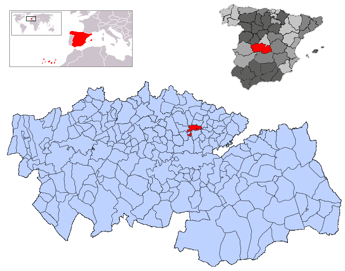 Recas en la provincia de Toledo